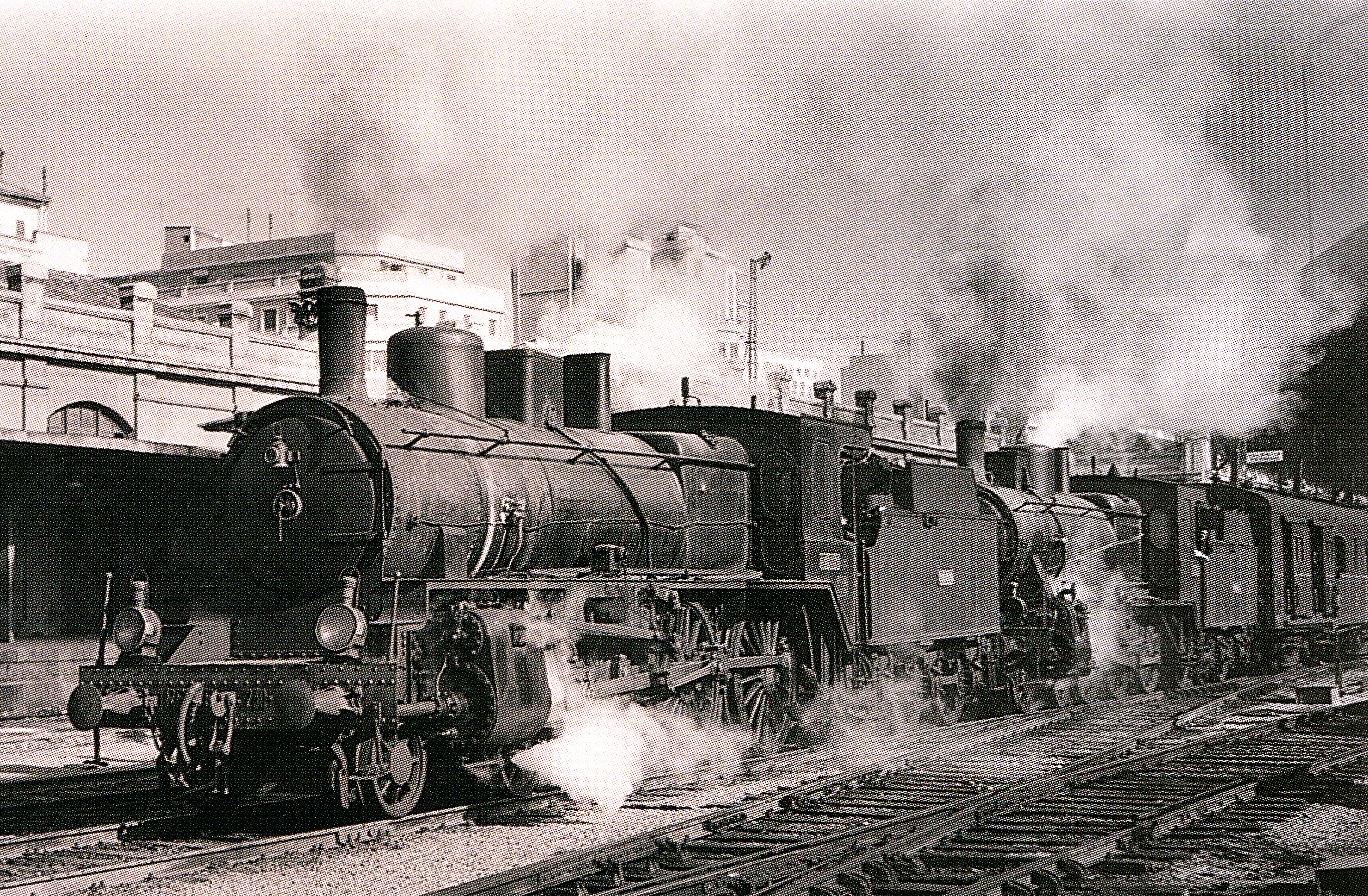 Locomotora 230-2085